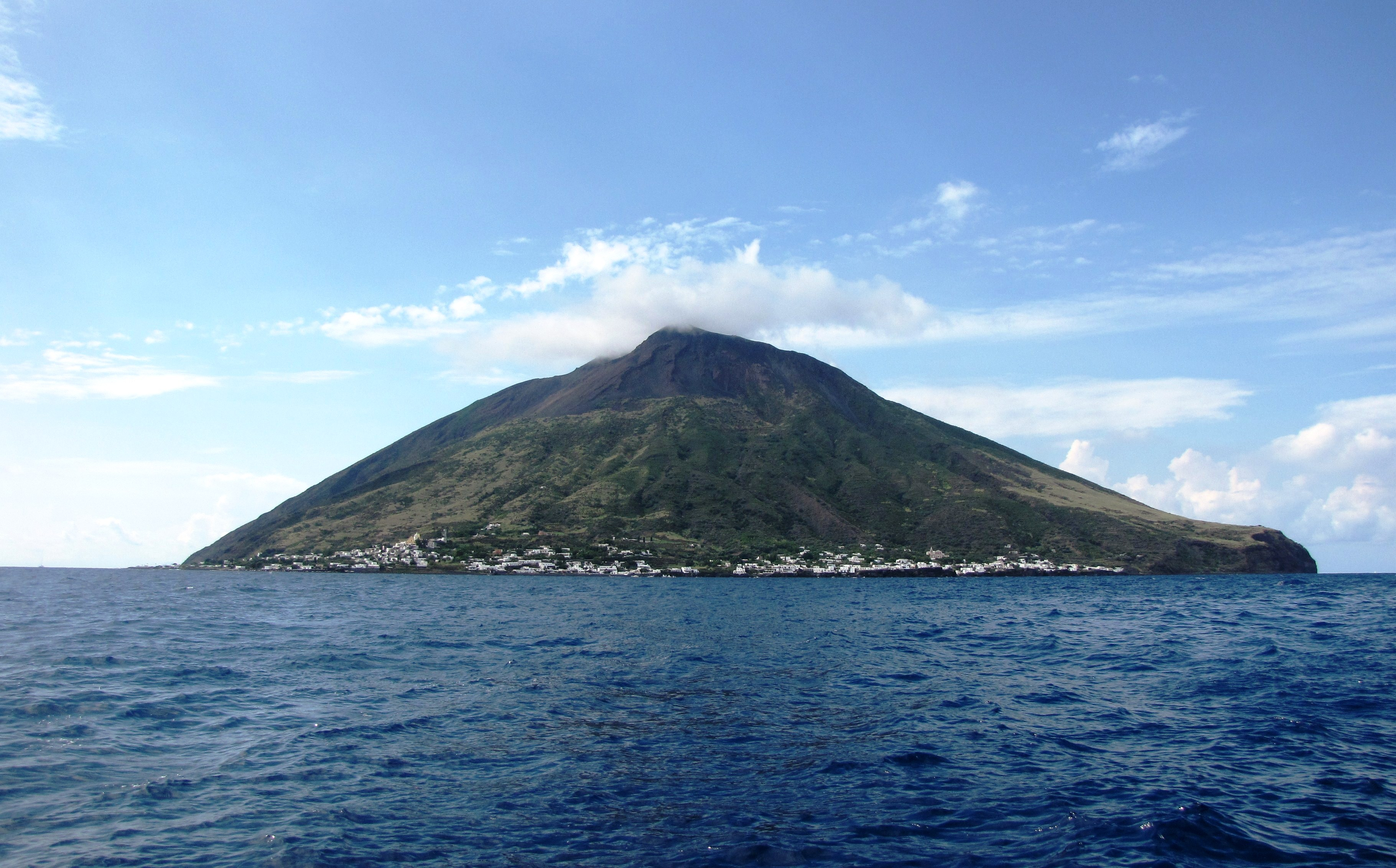 Panorama view-het vulkaan eiland Stromboli